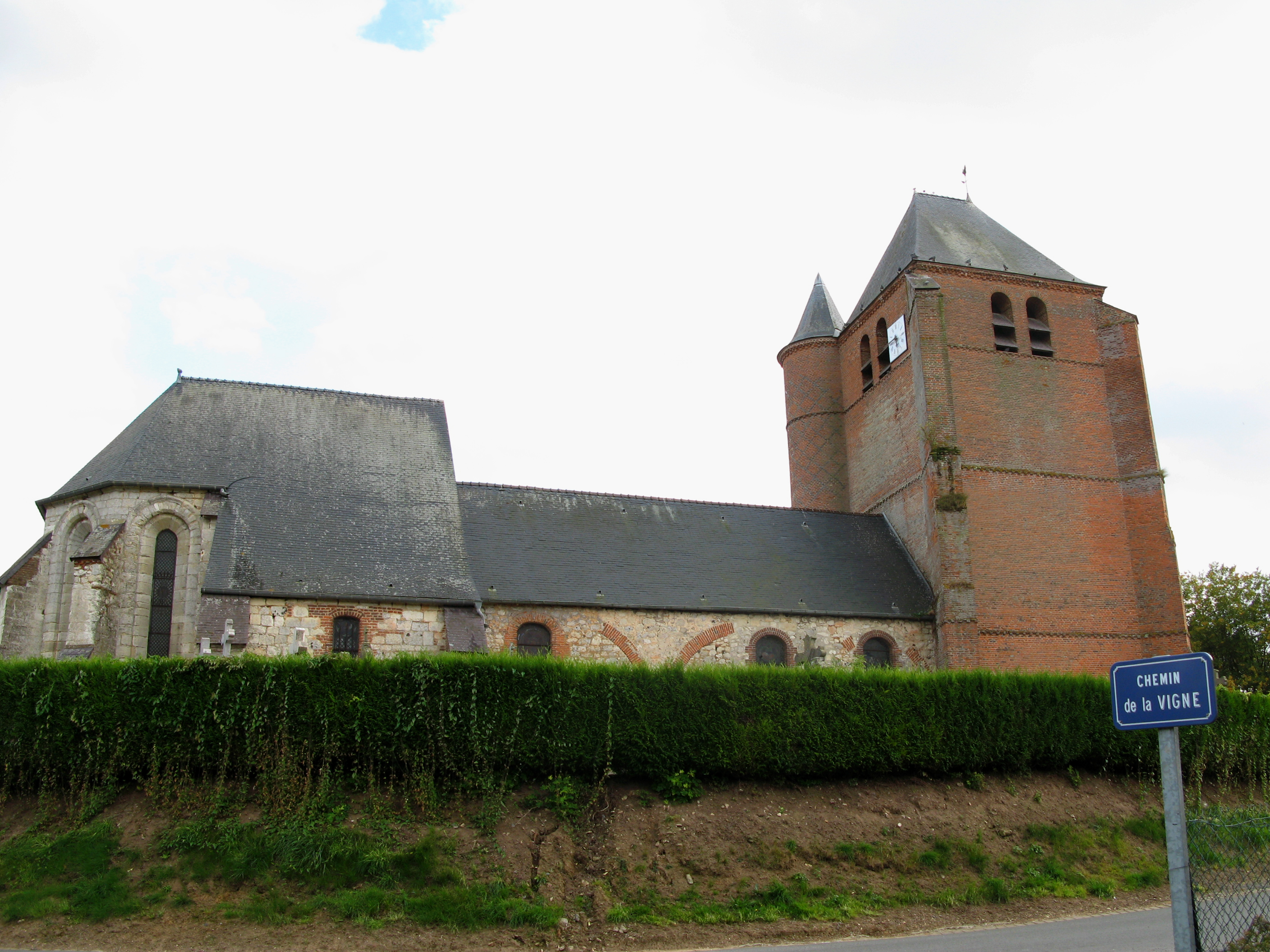 Hary (Aisne, France) Façade nord de l'église fortifiée. Comme à Burelles, le surplomb naturel sur le côté nord contribuait, en cas d'attaque, à la protection de l'édifice.